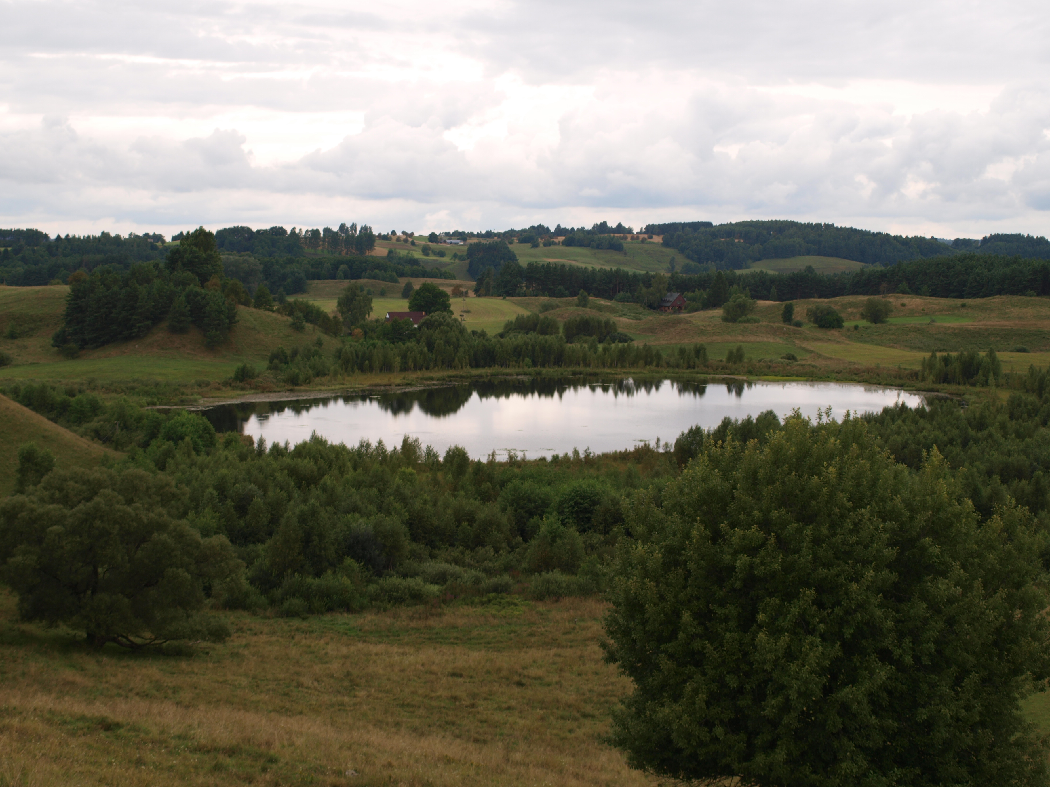 Wytopiskowe jezioro Linówek w Zagłębieniu Szeszupy na terenie Suwalskiego Parku Narodowego. "Amfiteatr Wodziłkowski". Widok z platformy widokowej.